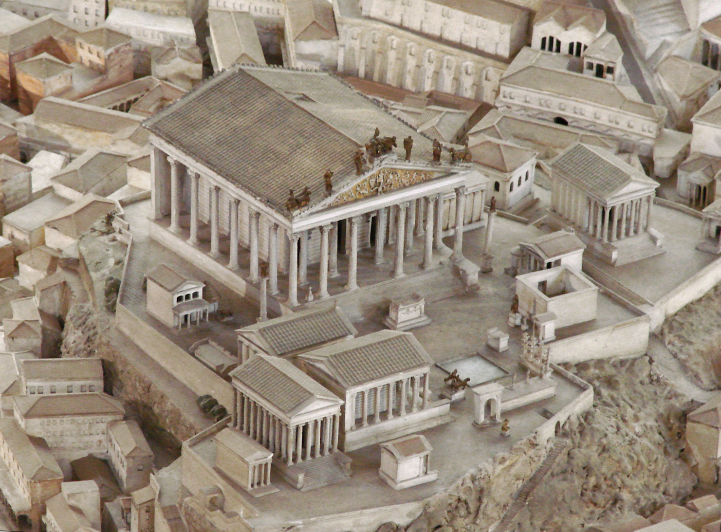 Le Capitole Grâce à sa position stratégique, le Capitole fut la forteresse naturelle de Rome. Dominant d'un coté le Tibre et de l'autre la vallée du Forum, il permettait le contrôle du fleuve et de l'accès à la mer. La colline comportait deux sommets séparés par une dépression. Sur le sommet septentrional, fortifié a été élevé le Temple dédié à la Triade Capitoline : le Temple de Jupiter Très Bon et Très Grand (Triade : Jupiter, Junon, Minerve) ________________ La maquette de Rome à l'époque de Constantin (306-337) réalisée par Italo Gismondi entre 1933 et 1937. Cette maquette à l'échelle 1/250 est présentée au musée de la civilisation romaine à l'EUR à Rome.